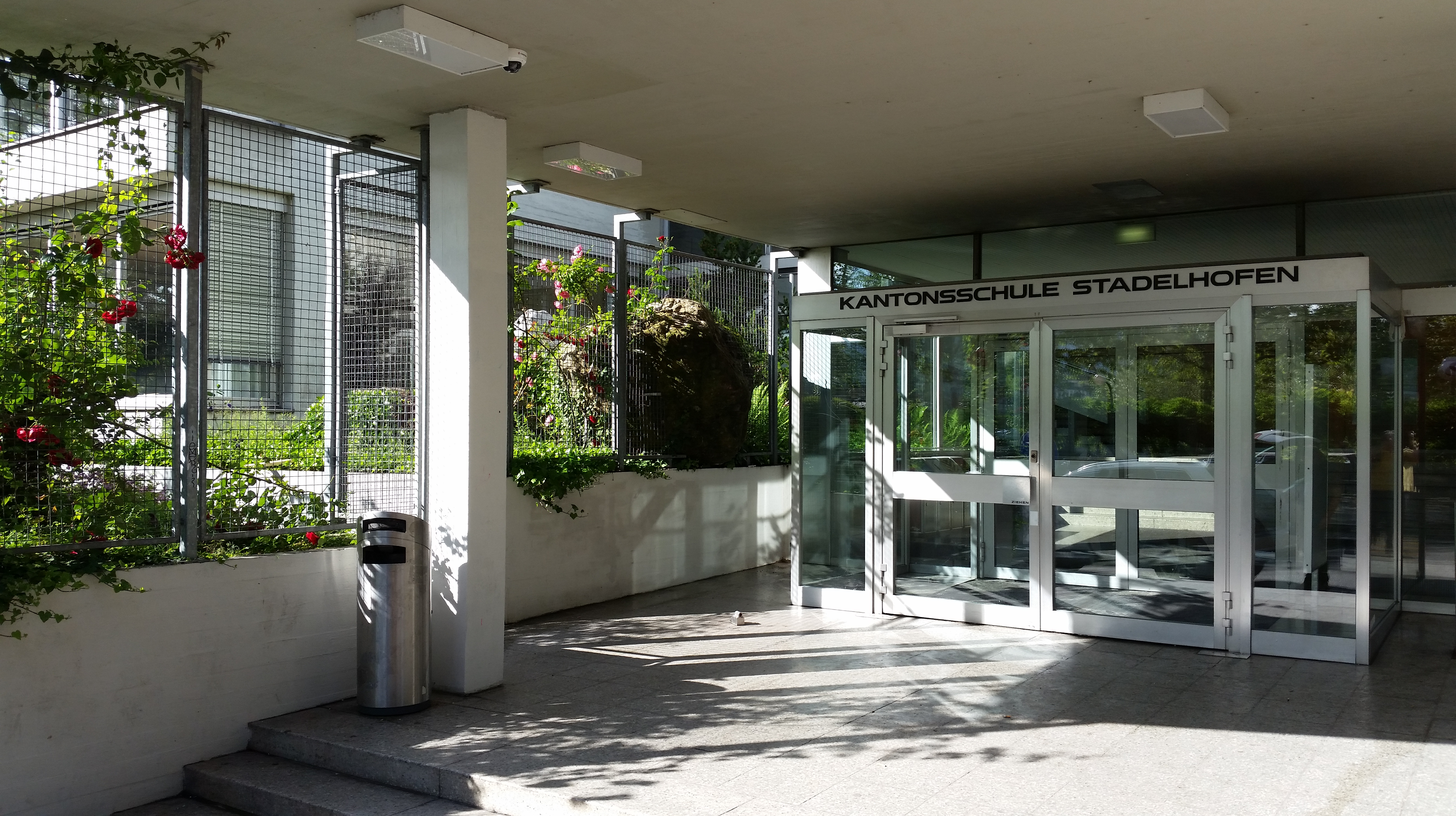 Kantonsschule Stadelhofen in Zürich (Switzerland)